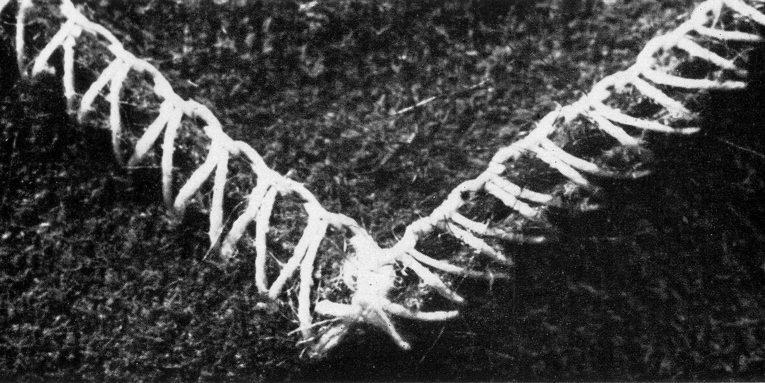 Nähte in der Kürschnerei: Absatz „Nähtechnik, Ledernähte, Maschinennähte; Bildunterschrift Zacken-Naht, stark vergrößert“.